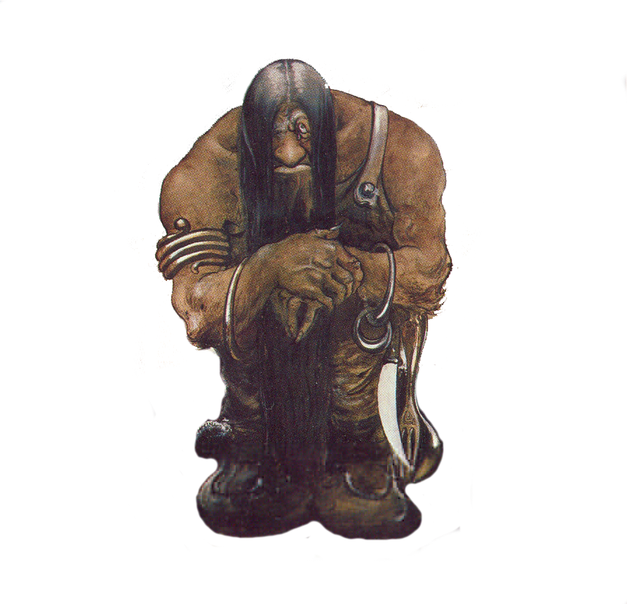 Namn: Ett gammalt bergtroll *Name: An old mountain troll *Konstnär / Artist: John Bauer *År / Year: 1904 *Size: Appr. 35 x 38 centimters ==